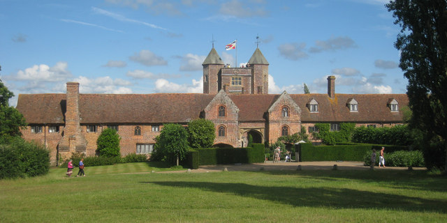 Sissinghurst Castle, Biddenden Road, Sissinghurst, Kent